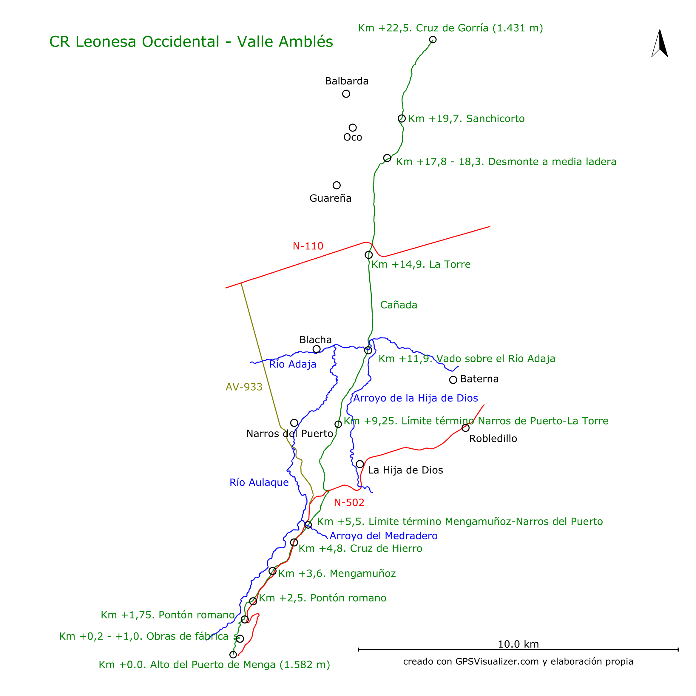 Esquema trazado Cañada Real Leonesa Occidental a través del Valle de Amblés, (Ávila), España.